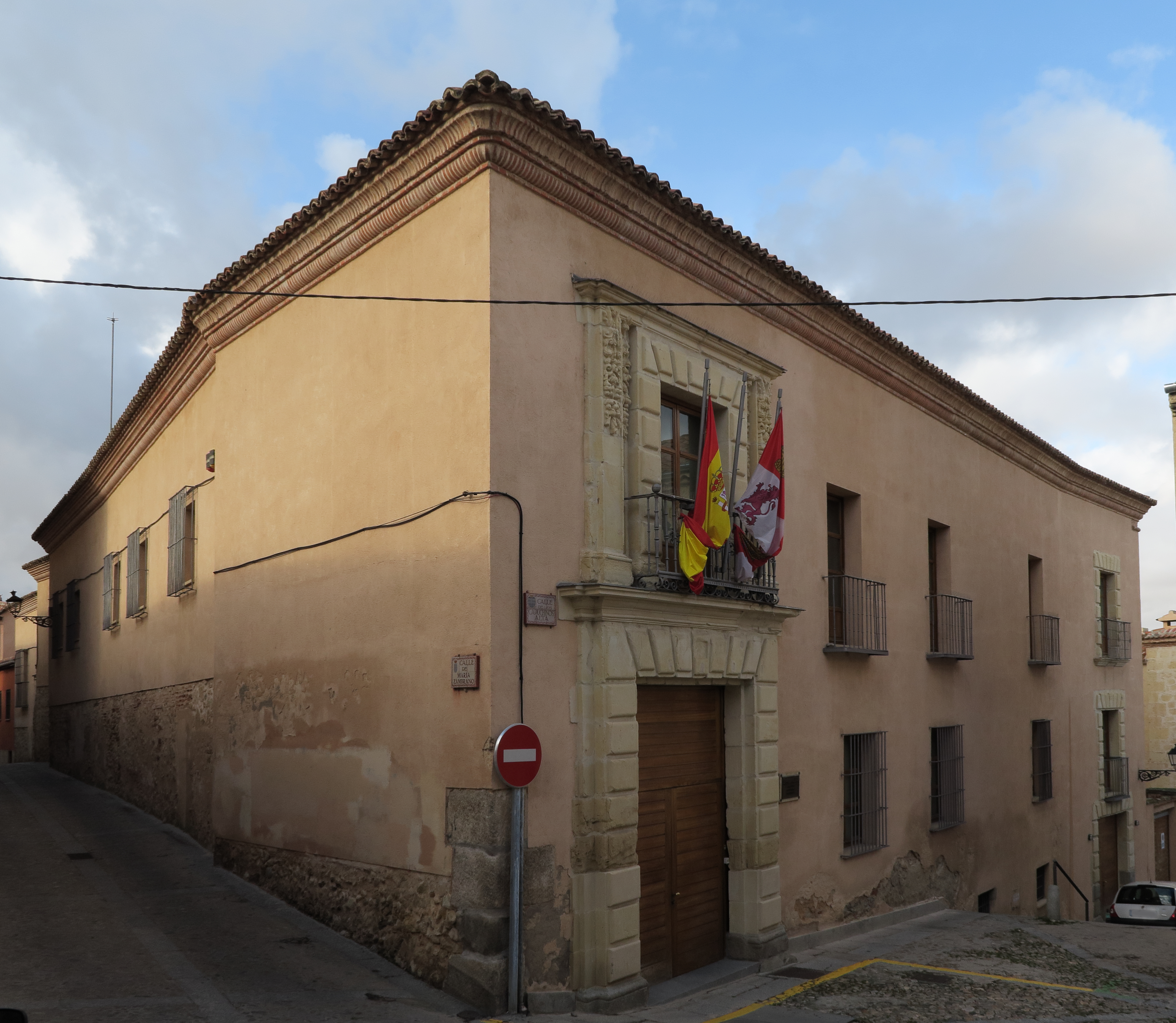 Inmueble de la calle Capuchinos Alta 7